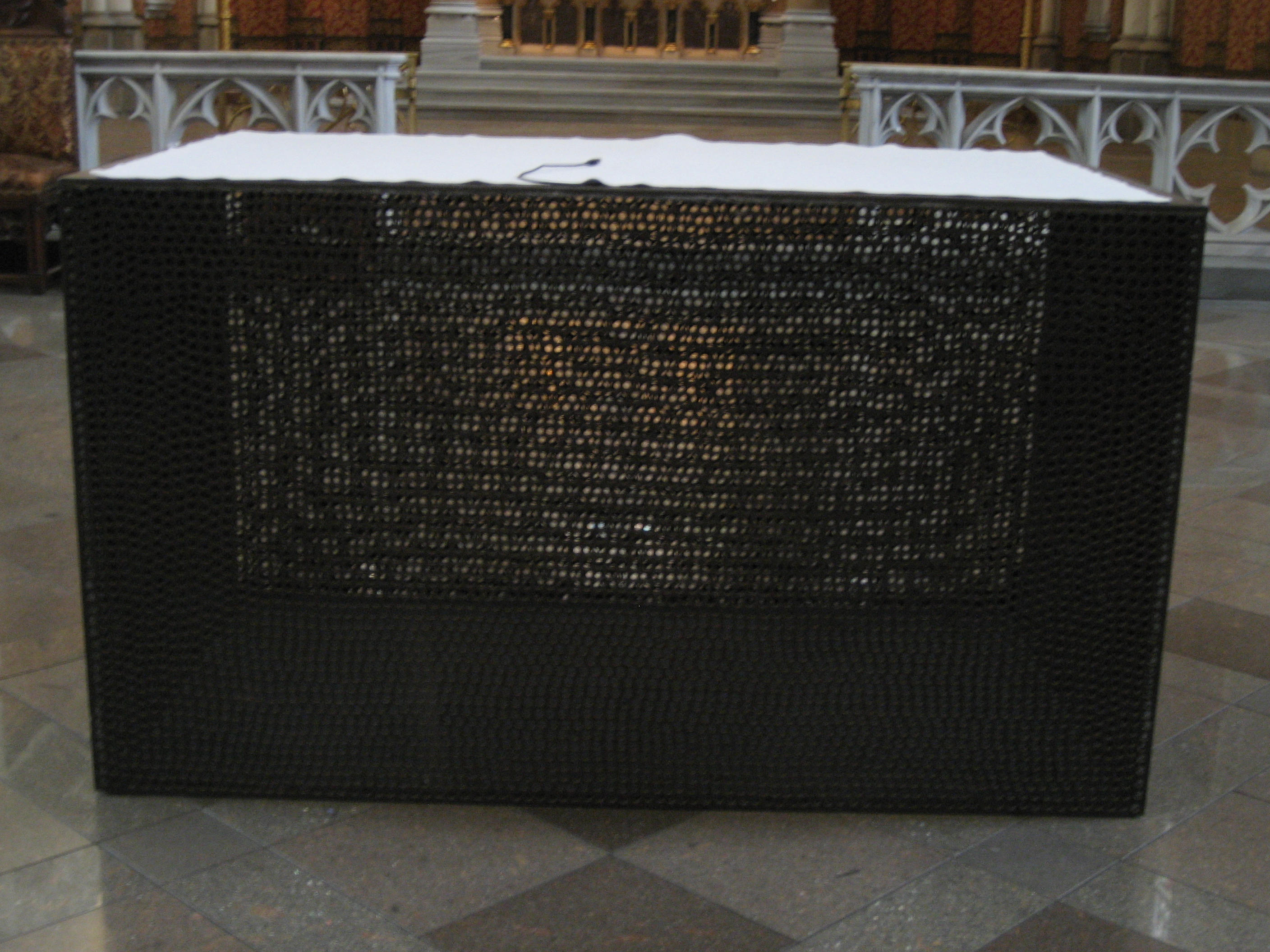 Herz-Jesu-Kirche in Graz, Austria, Altar, Künstler Gustav Troger, um 1988